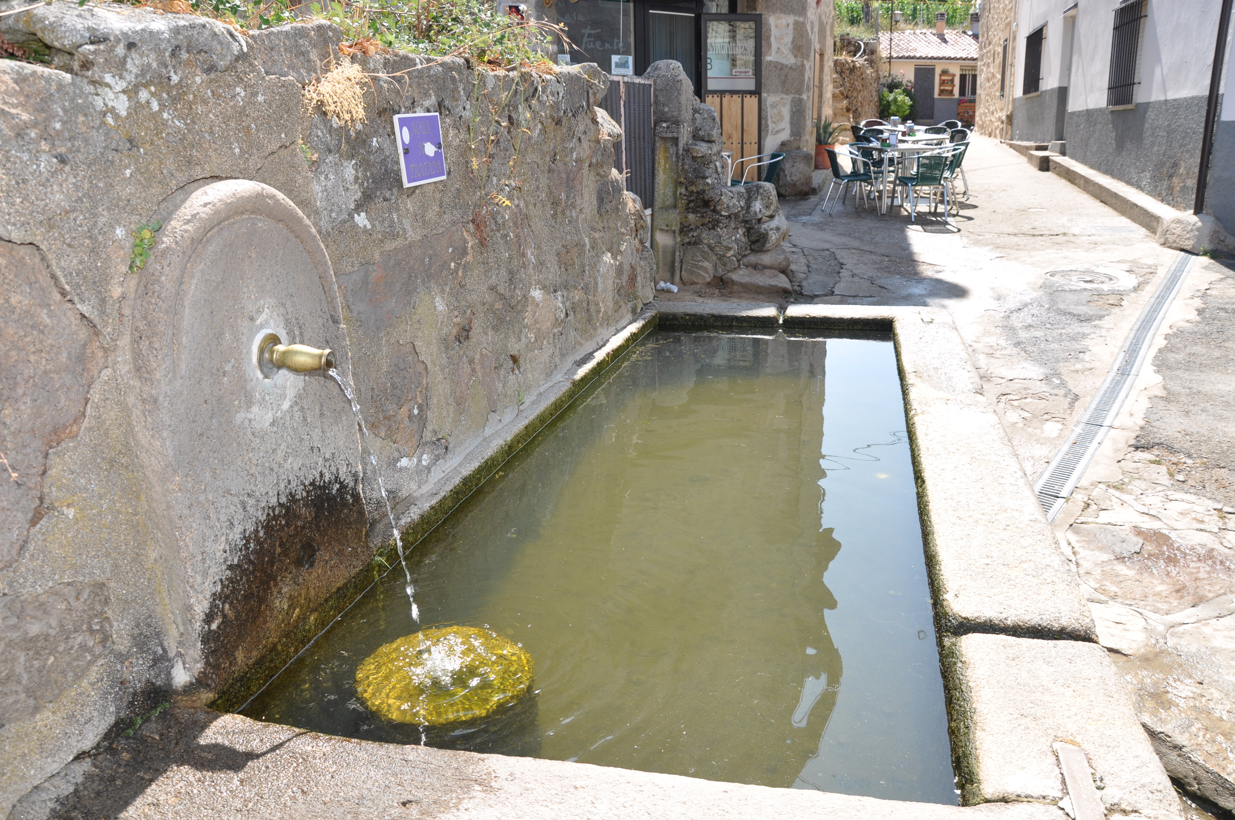 Fuente y abrevadero en Umbrías, Ávila, España